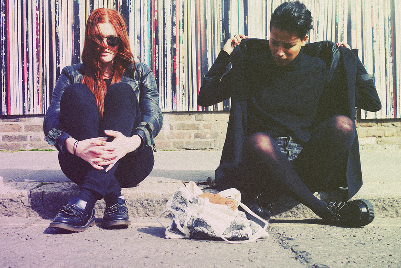 Den svenska duon Icona Pop.